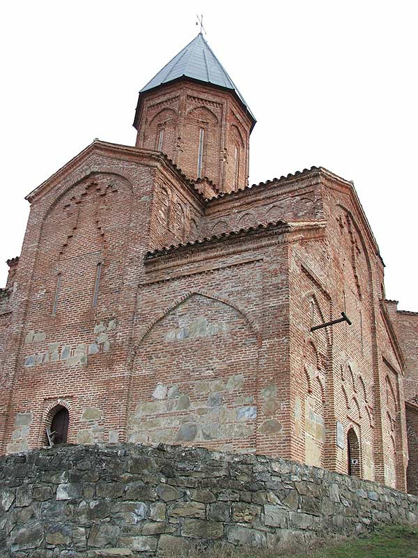 Gremi (გრემი)